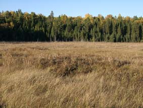 Aussicht über Algonkin own work 04.10.2000 Ute Meyer-Henning, Jens Henning